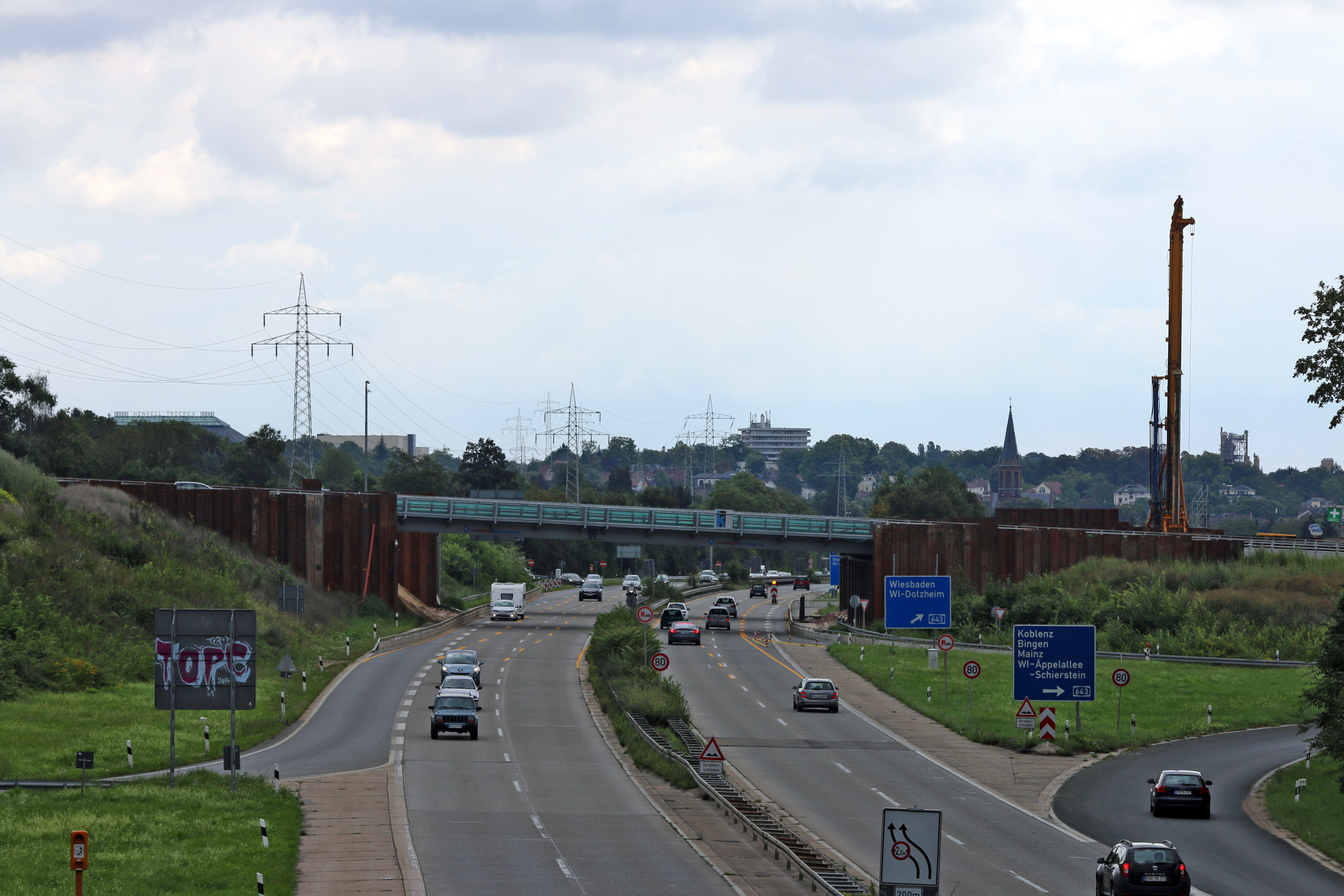 Neubau des Schiersteiner Kreuz: Neubau 2014